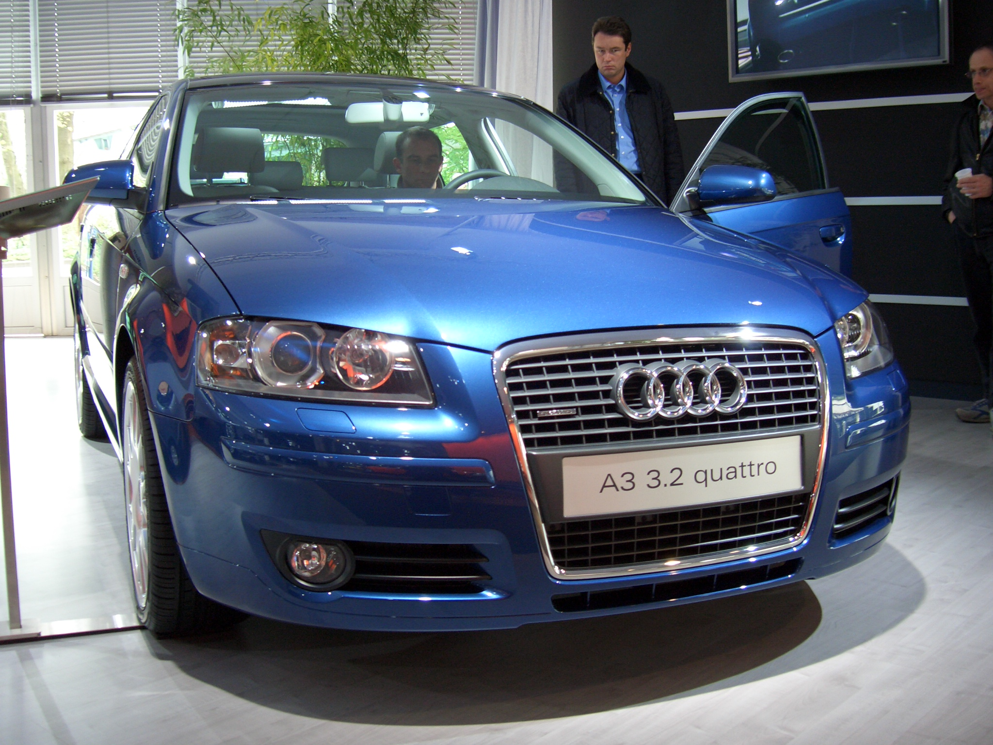 Втората генерация Ауди А3 Автор: HSV - собствена снимка